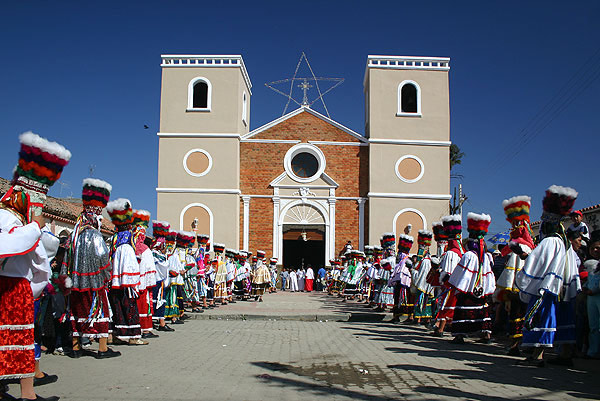 Iglesia de San Lorenzo, Tarija, Bolivia. This medium shows the protected monument with the number T/00-012 in Bolivia.